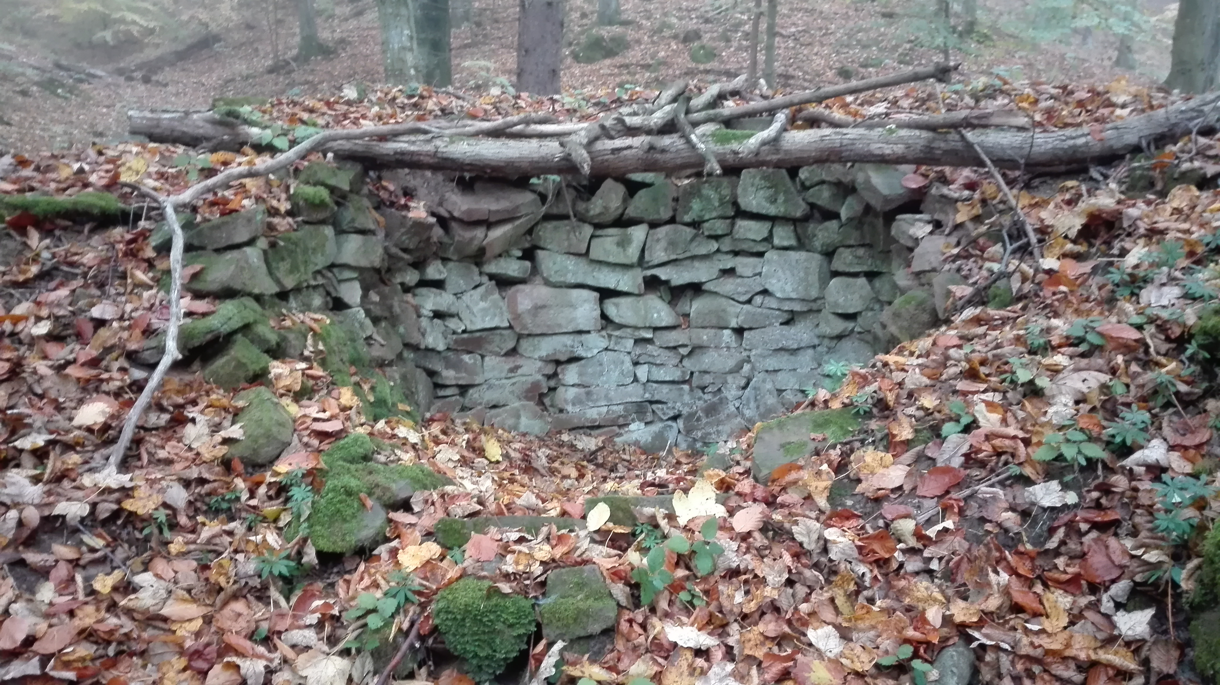 Pec na vápno - okraj NPR Habrůvecká bučina